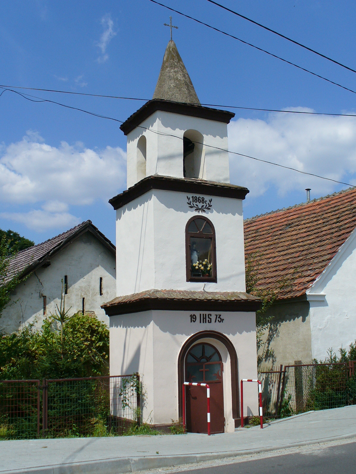 Dziekaństwo. Kapliczka